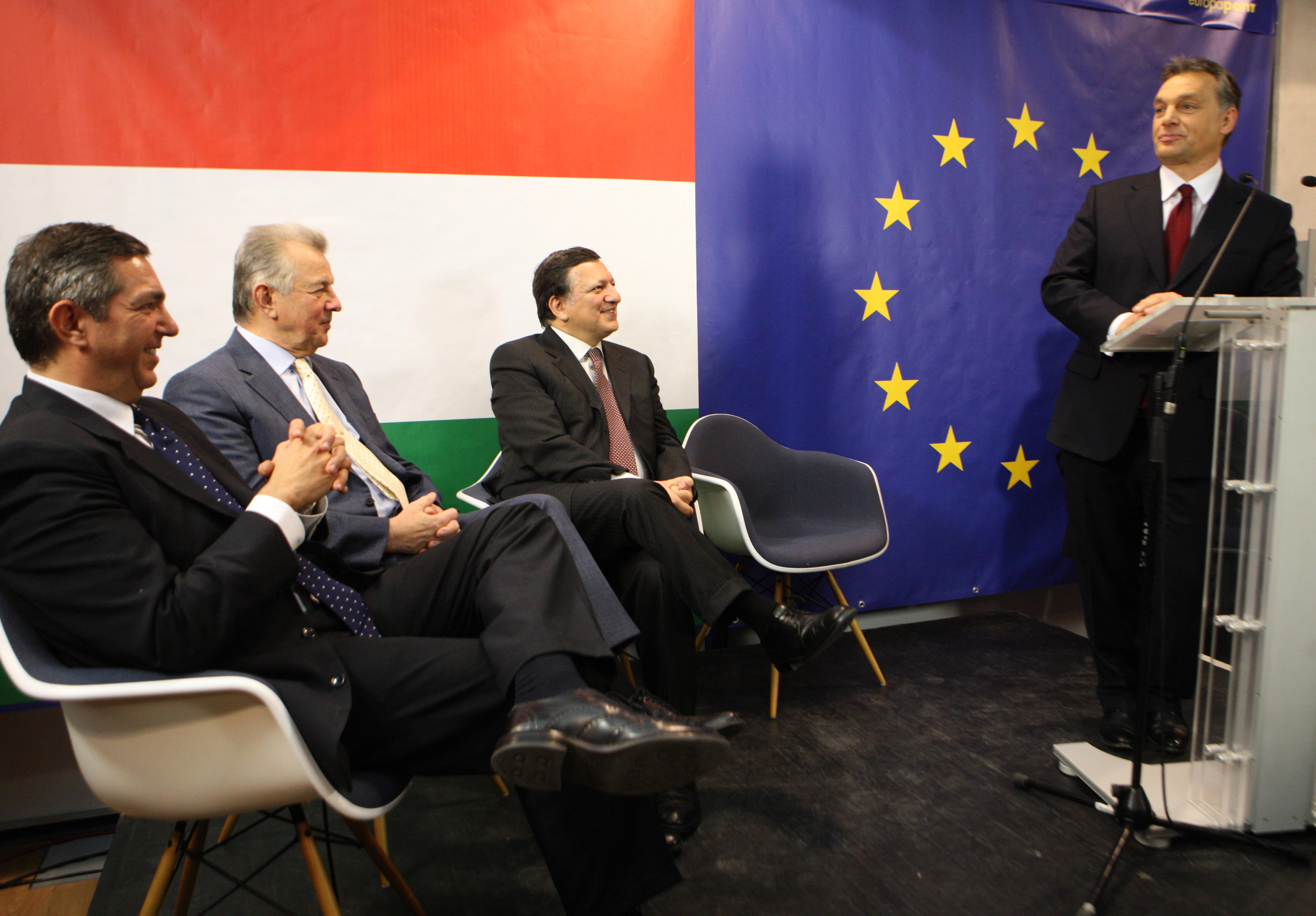 Budapest, 2011-01-07 Az Európa Pont ünnepélyes avatásán: Stavros Lambrinidis az Európai Parlament alelnöke, Schmitt Pál a Magyar Köztársaság elnöke és José Manuel Barroso az Európai Bizottság elnöke Orbán Viktor magyar miniszterelnök beszédét hallgatja. Az épület átadása óta itt működik az Európai Bizottság Magyarországi Képviselete és az Európai Parlament Tájékoztatási Irodája. Fotó: Európai Bizottság/ Dudás Szabolcs